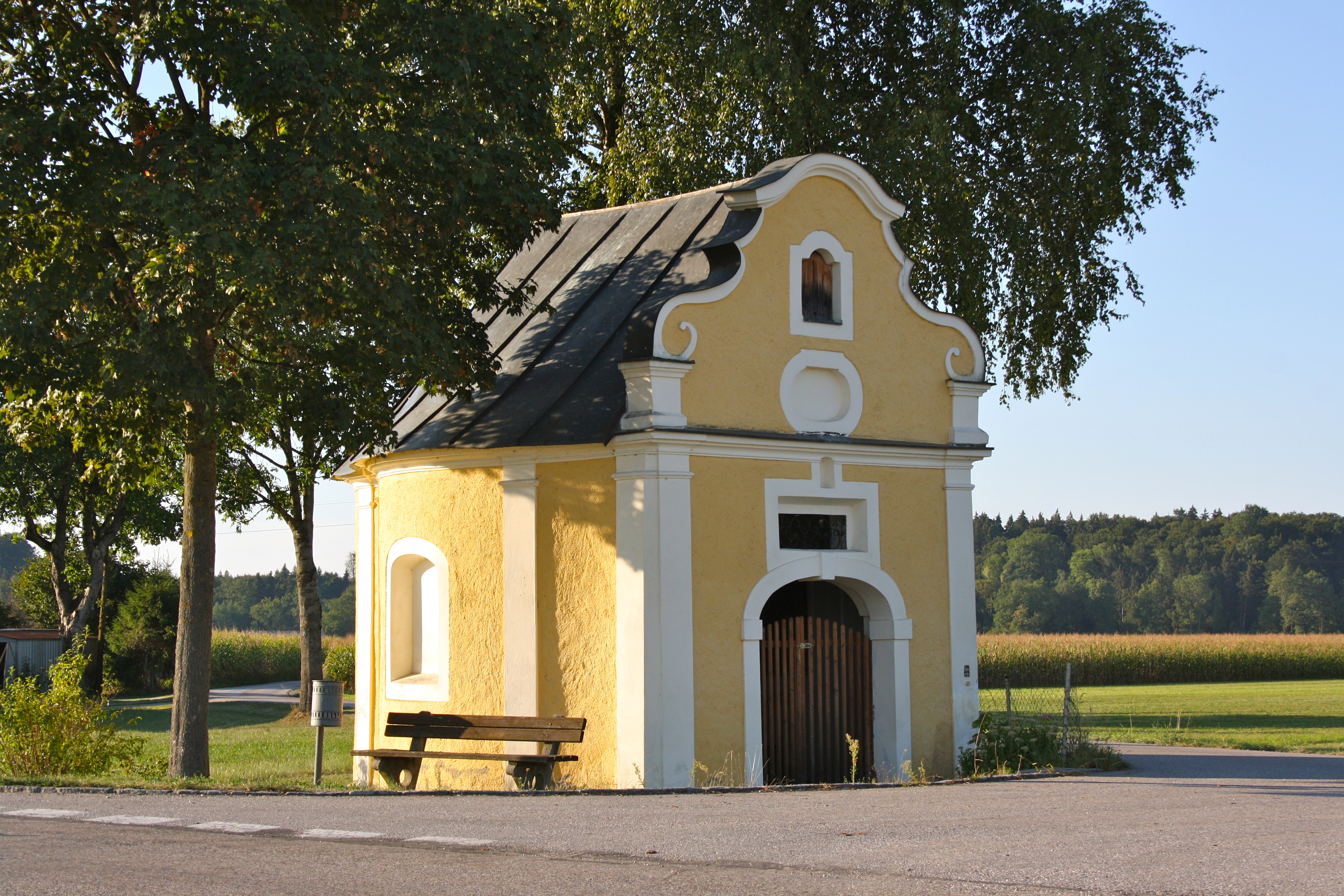 Weitfeldkapelle, Dietrichkapelle